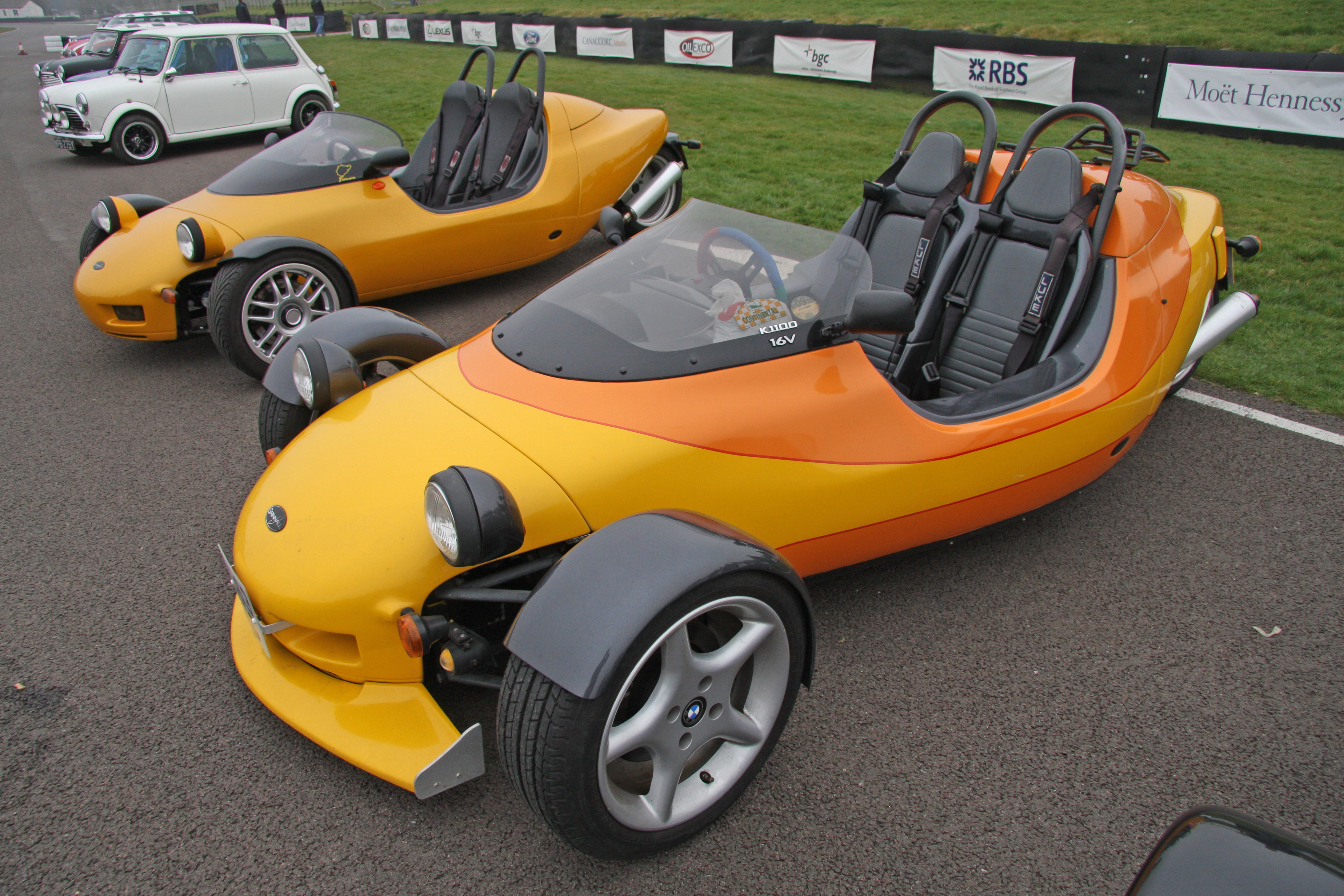 Grinnall Scorpion III